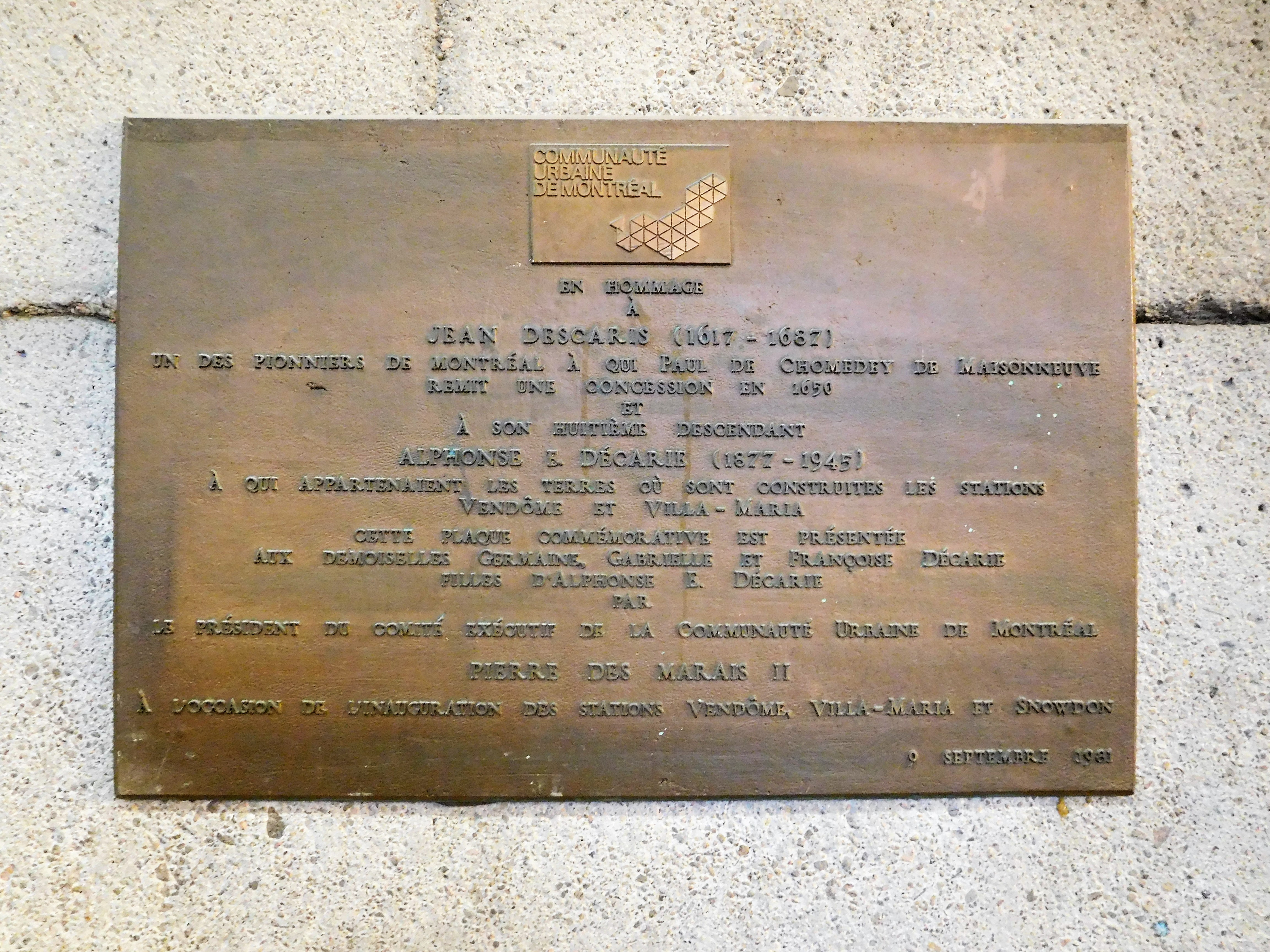 Plaque située à la station Vendôme du métro de Montréal « Plaque en hommage à Jean Descaris (1617-1687), un des pionniers de Montréal à qui Paul de Chomedey de Maisonneuve remit une concession en 1650, et à son huitième descendant, Alphonse E. Décarie (1877-1945), à qui appartenaient les terres où sont construites les stations Vendôme et Villa-Maria. Cette plaque commémorative est présentée aux demoiselles Germaine, Gabrielle et Françoise Décarie, filles d'Alphonse E. Décarie par le président du comité exécutif de la Communauté Urbaine de Montréal, Pierre Des Marais II, à l'occasion de l'inauguration des stations Vendôme, Villa-Maria et Snowdon. 9 septembre 1981 »